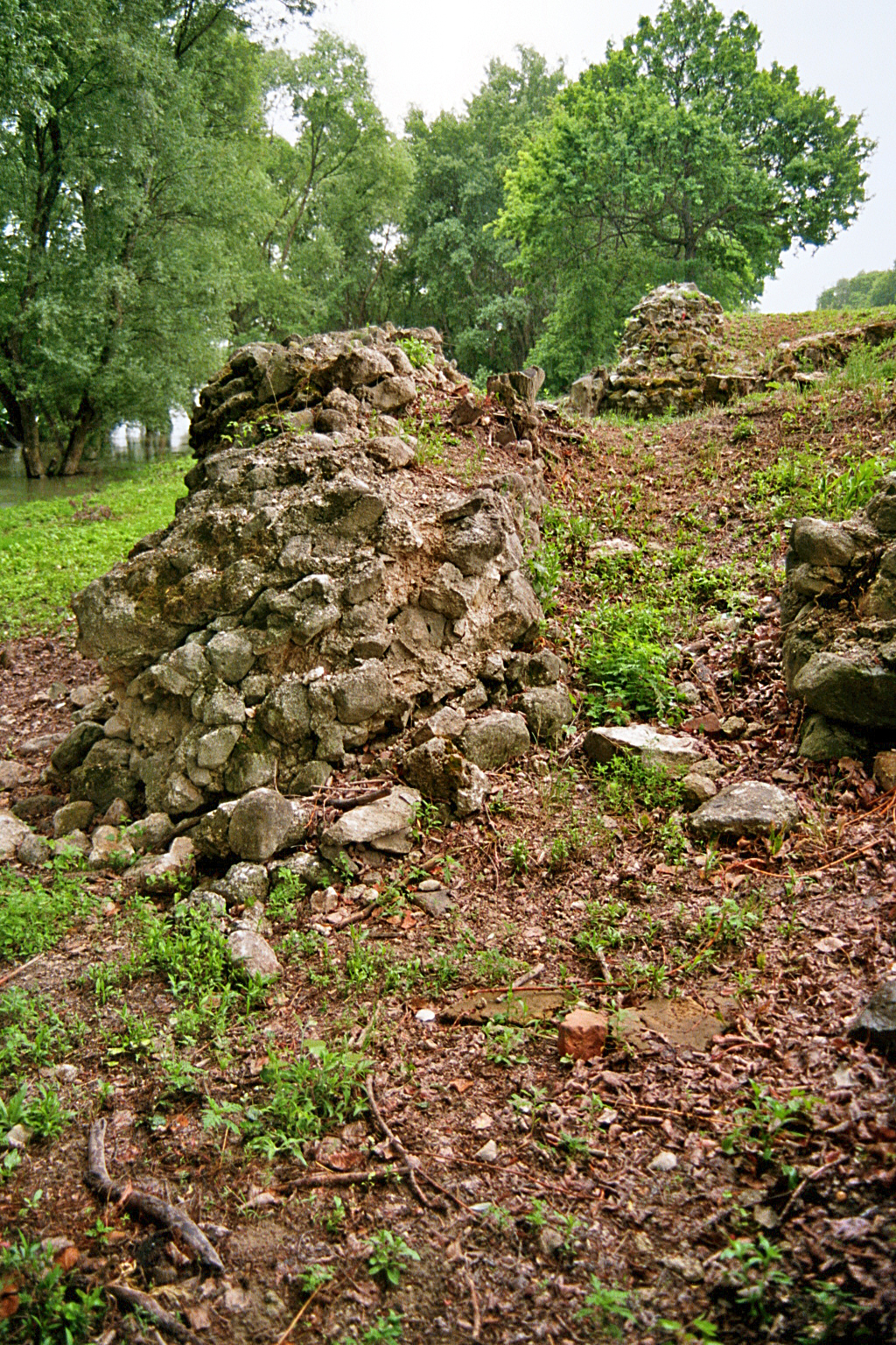 Burgus Szigetmonostor-Horány (ungarischer Donaulimes): In den Fluß abkippende Flügelmauer. Die Aufnahme wurde im strömenden Regen gemacht.